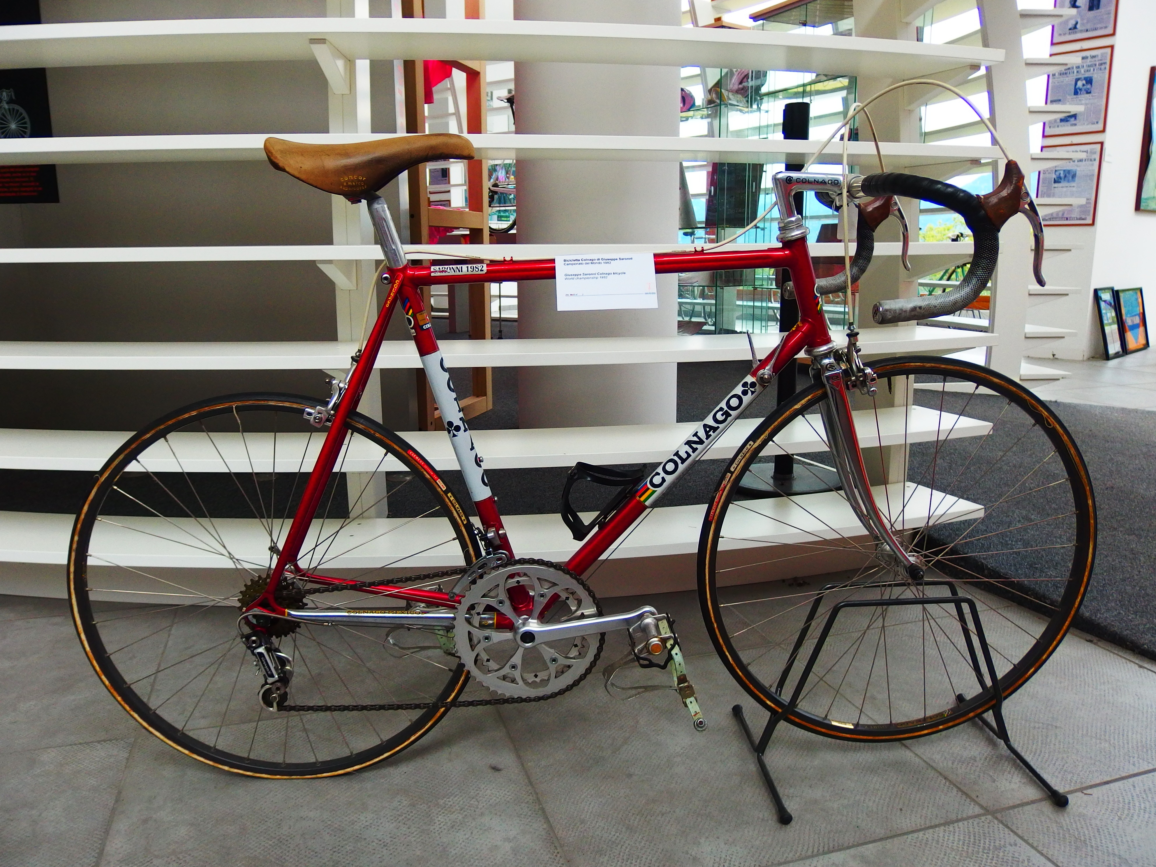 Colnago-Rad von Giuseppe Saronni, auf dem er 1982 Straßen-Weltmeister wurde